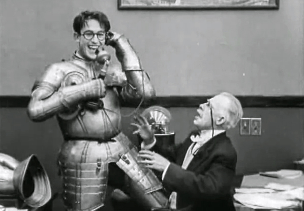 Гарольд Ллойд в фильме "Спросить отца" (1919).